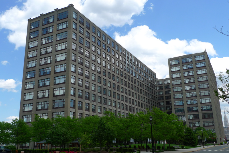 Hudson Tea Building 1500 Washington Street Hoboken, NJ 07030 Walter Burns Weichert Realtors